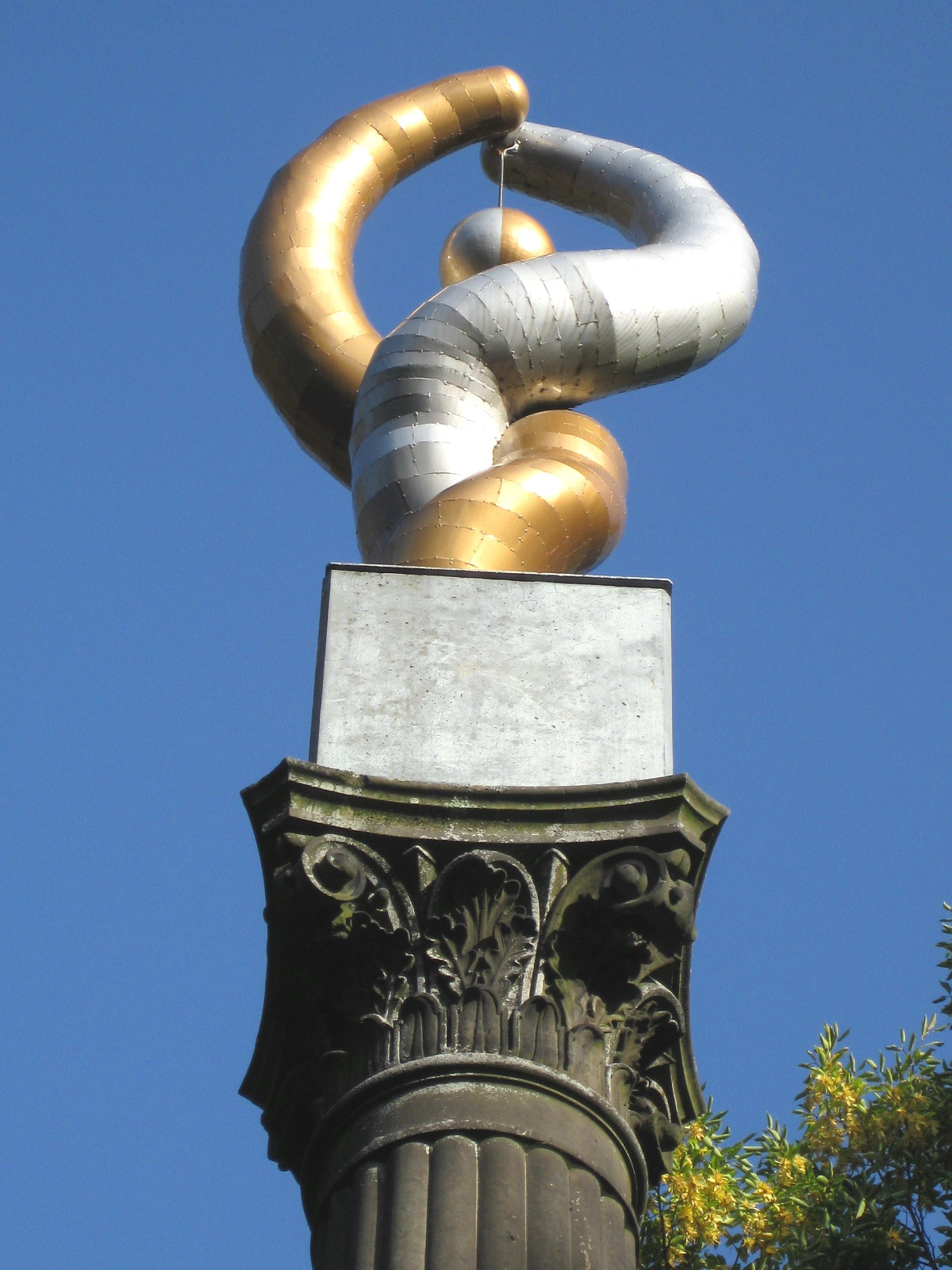 Skulptur "Die schützende Torsion" auf dem Ehrenmal auf dem Straßburger Platz in Osnabrück, angefertigt nach dem Entwurf von Schülerinnen des Osnabrücker Ratsgymnasiums. Sie ersetzte die im Zweiten Weltkrieg eingeschmolzene allegorische Germania und symbolisiert die deutsch-französische Freundschaft.